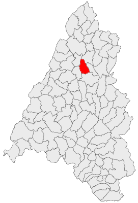 Categorie:Hărţi ale judeţului Bihor